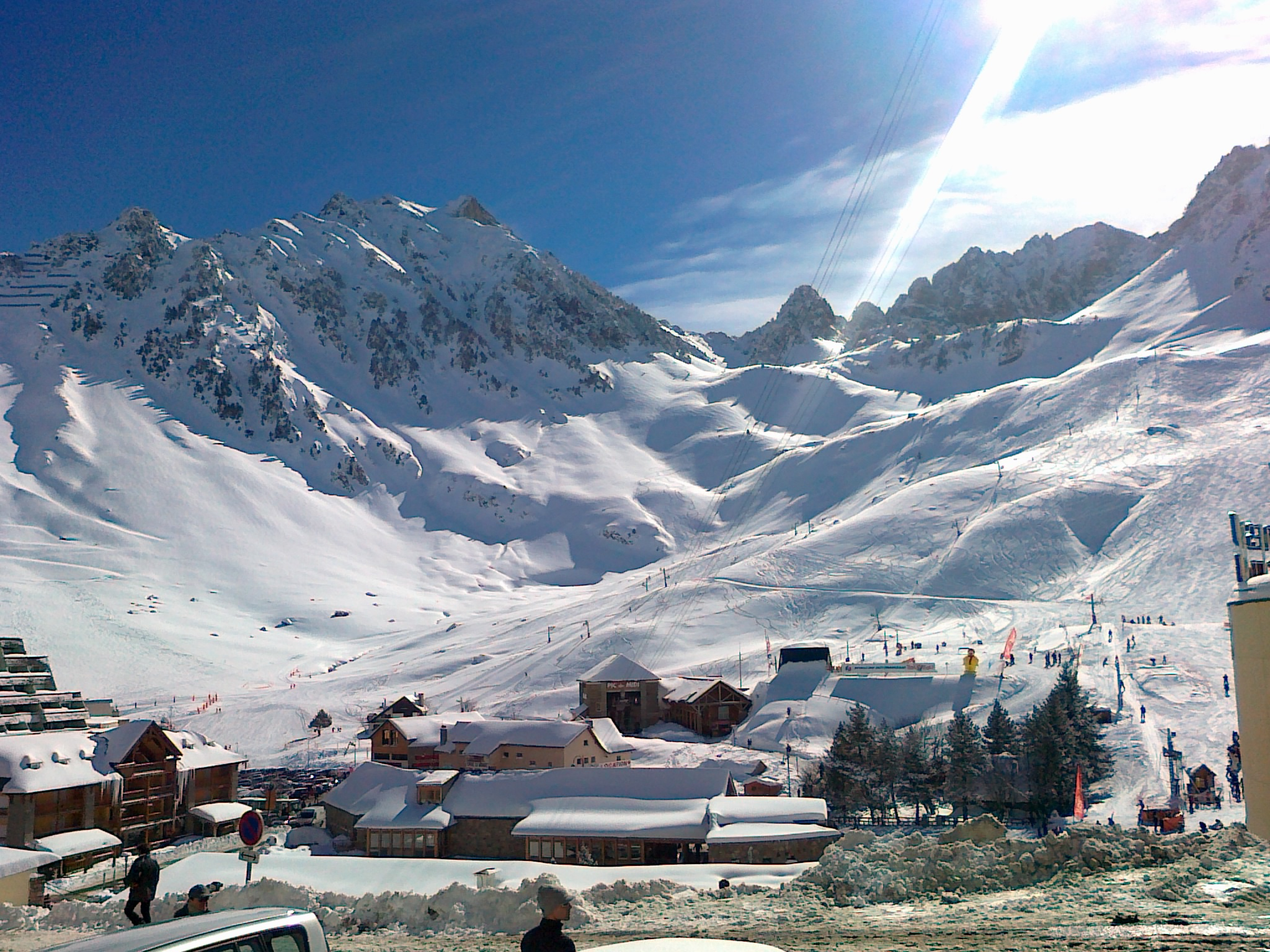 Station de ski de La Mongie (65) — France; Hautes-Pyrénées